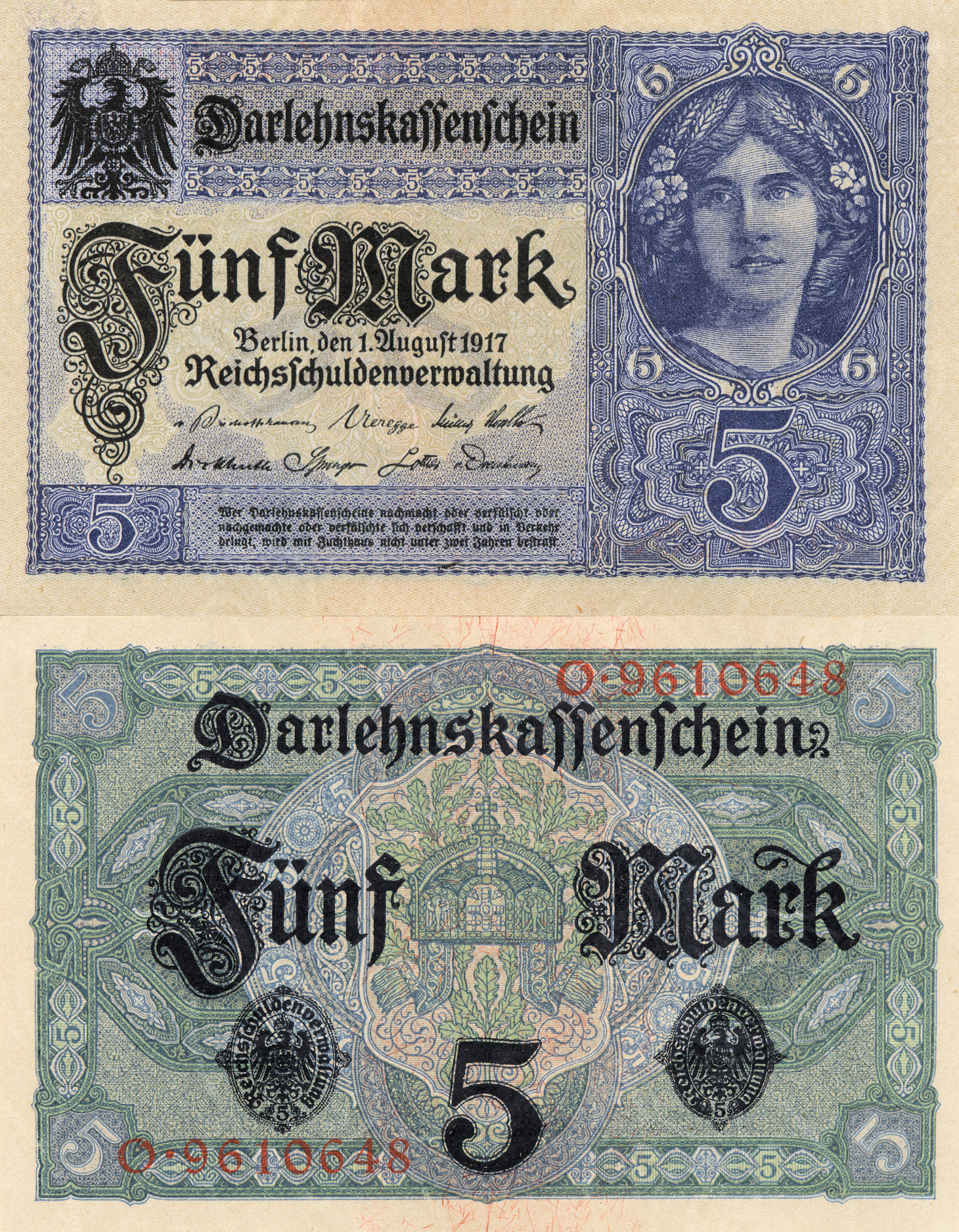 5 Mark, Darlehenskassenschein 1917